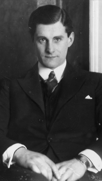 portrett, mann, økonomidirektør, teatersjef, sittende halvfigur.